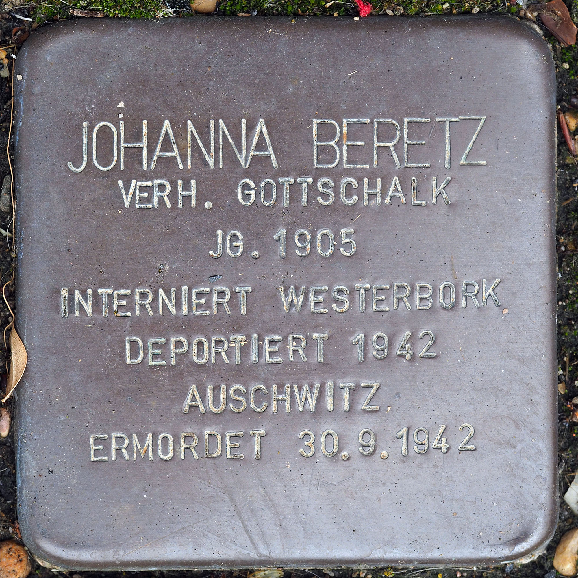 Stolpersteine GV: Gottschalk Johanna